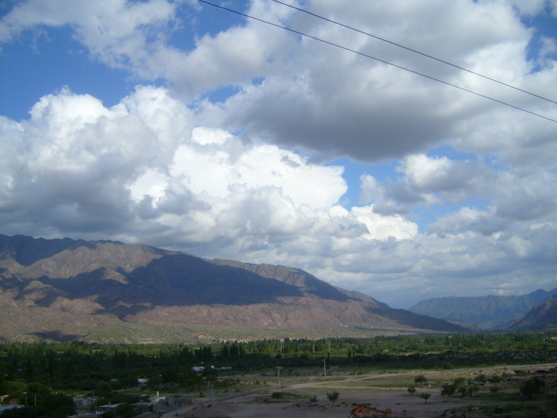 Sanagasta